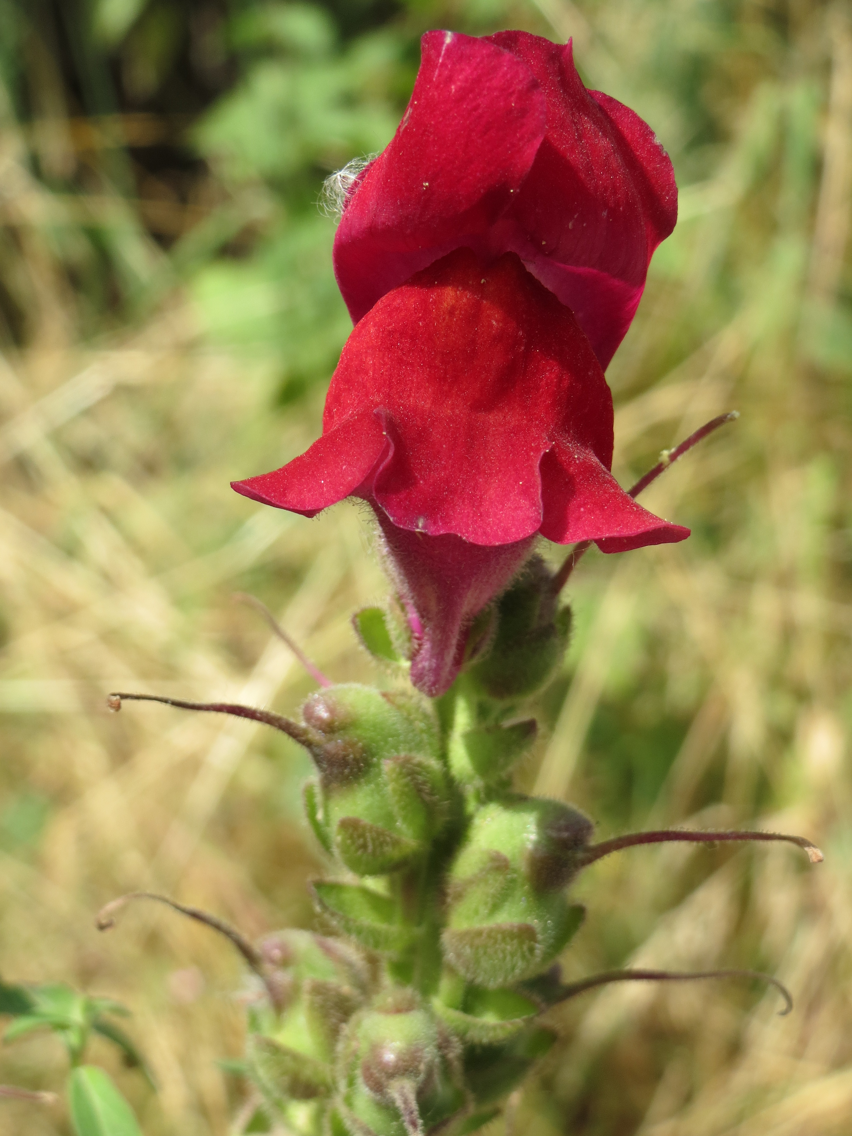 Großes Löwenmaul (Antirrhinum majus) im Naturschutzgebiet Silz (Altlußheim)